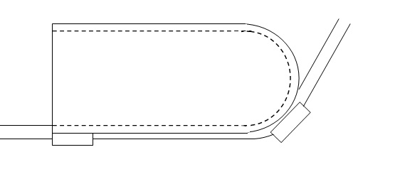 Esquema de curvadira de tubos.